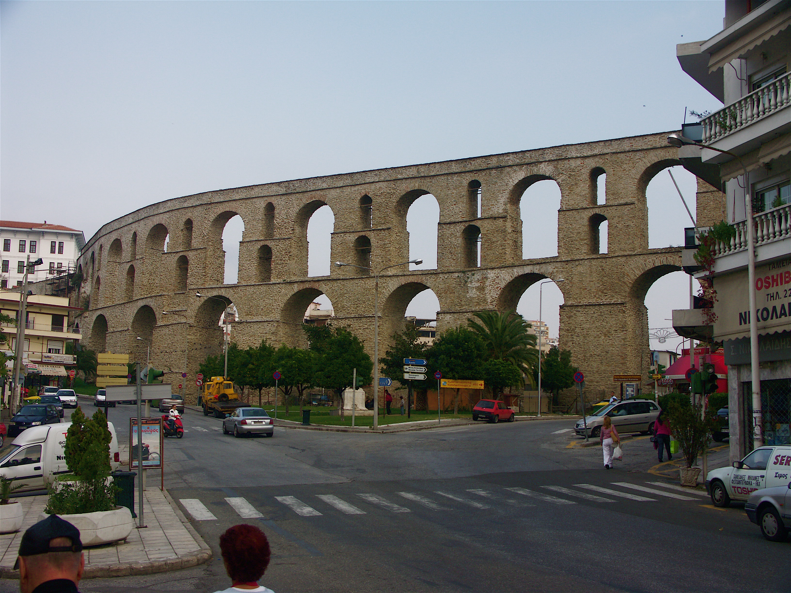 Kavala aqueduct